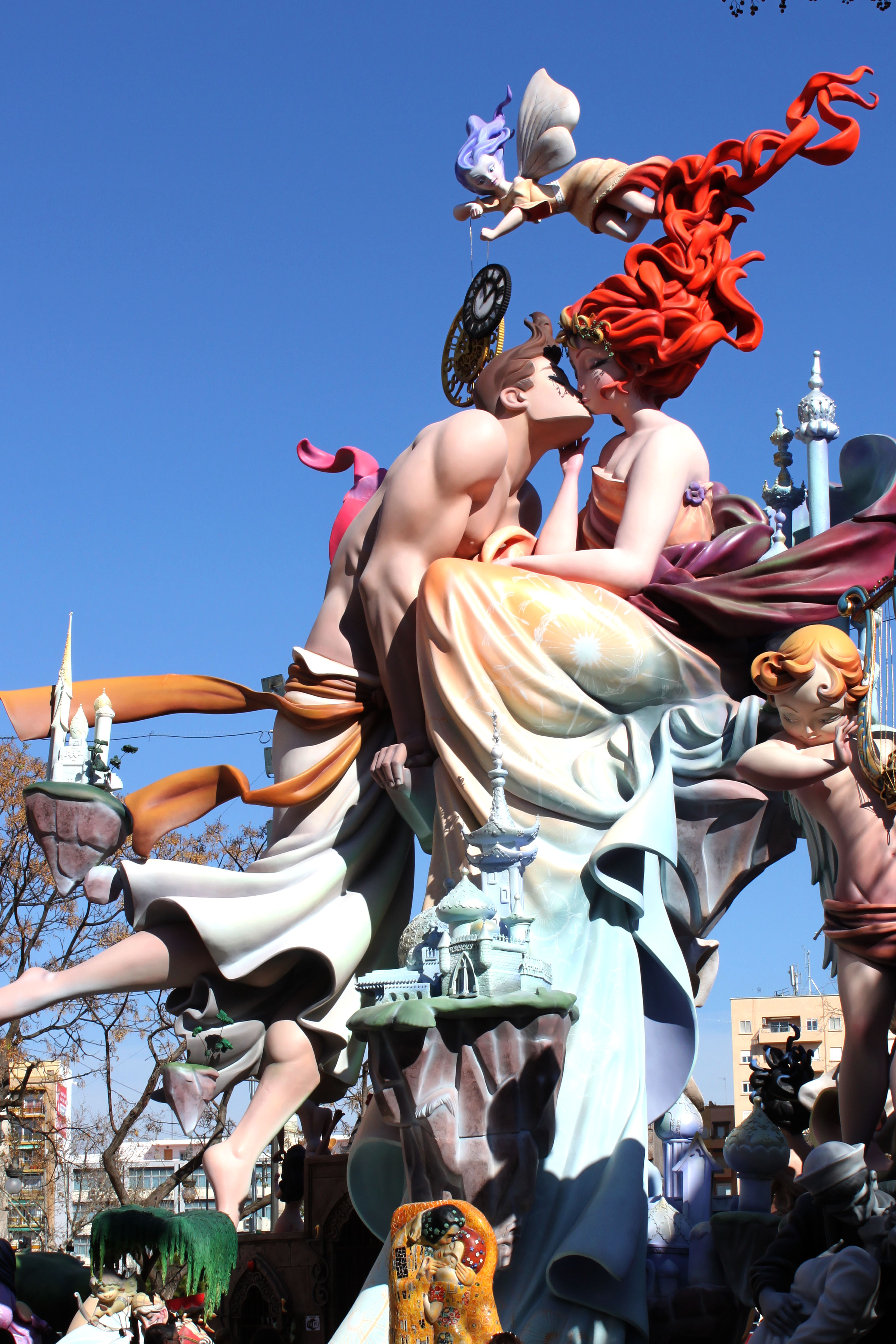 Falla de Na Jordana 2016. Valencia, Comunidad valenciana, España.